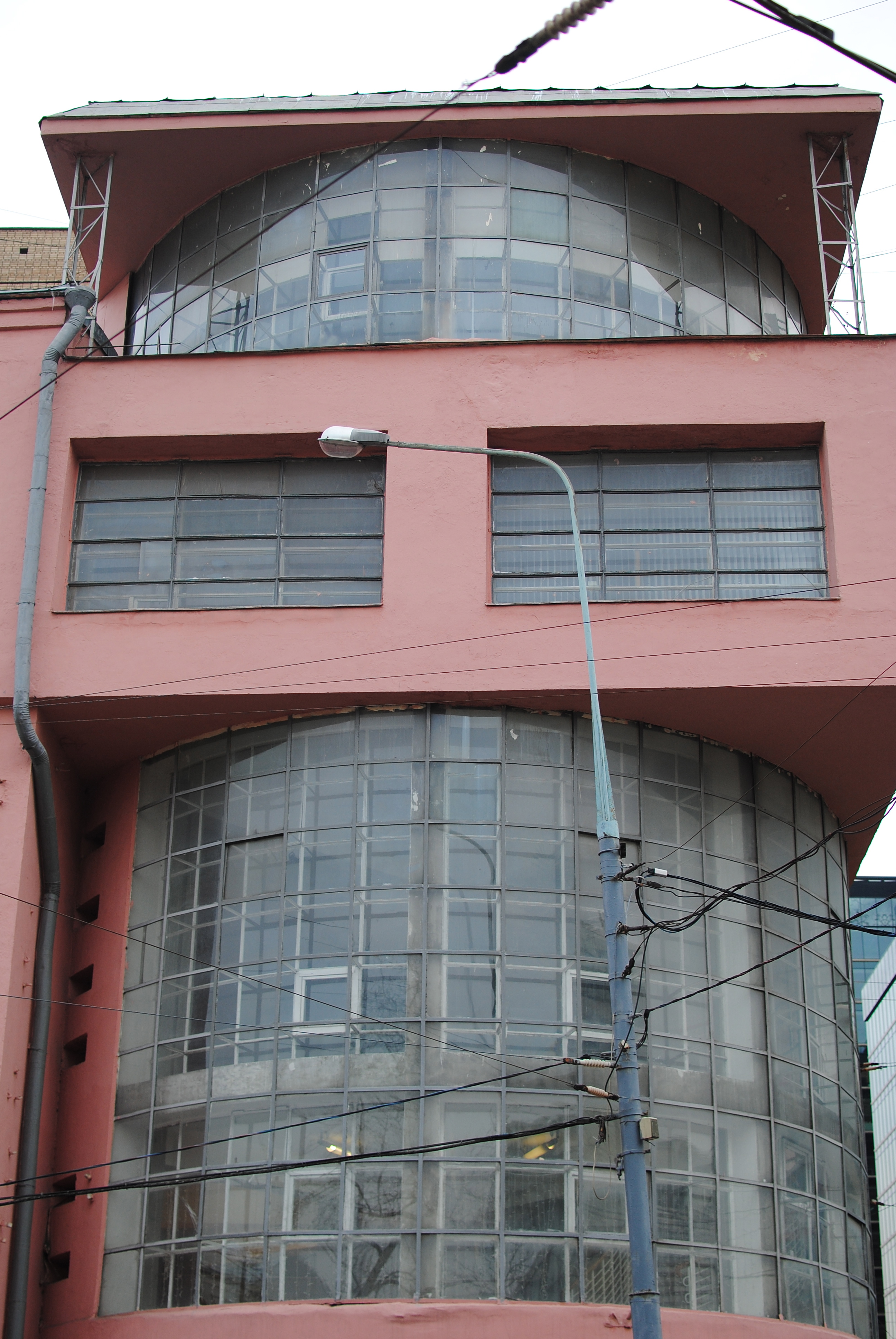 Здание клуба им. Зуева (Москва и Московская область, Москва, Лесная улица, 18)